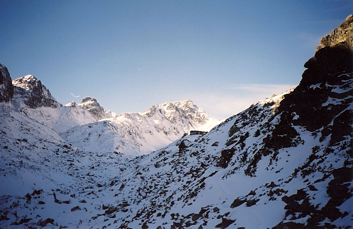 Magas-Tátra, Nagy-Tarpataki-völgy, Rabló menedékház